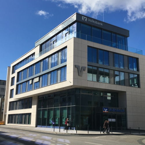 Neue Hauptstelle der Volksbank Rhein-Nahe-Hunsrück eG, Salinenstraße 34, 55543 Bad Kreuznach